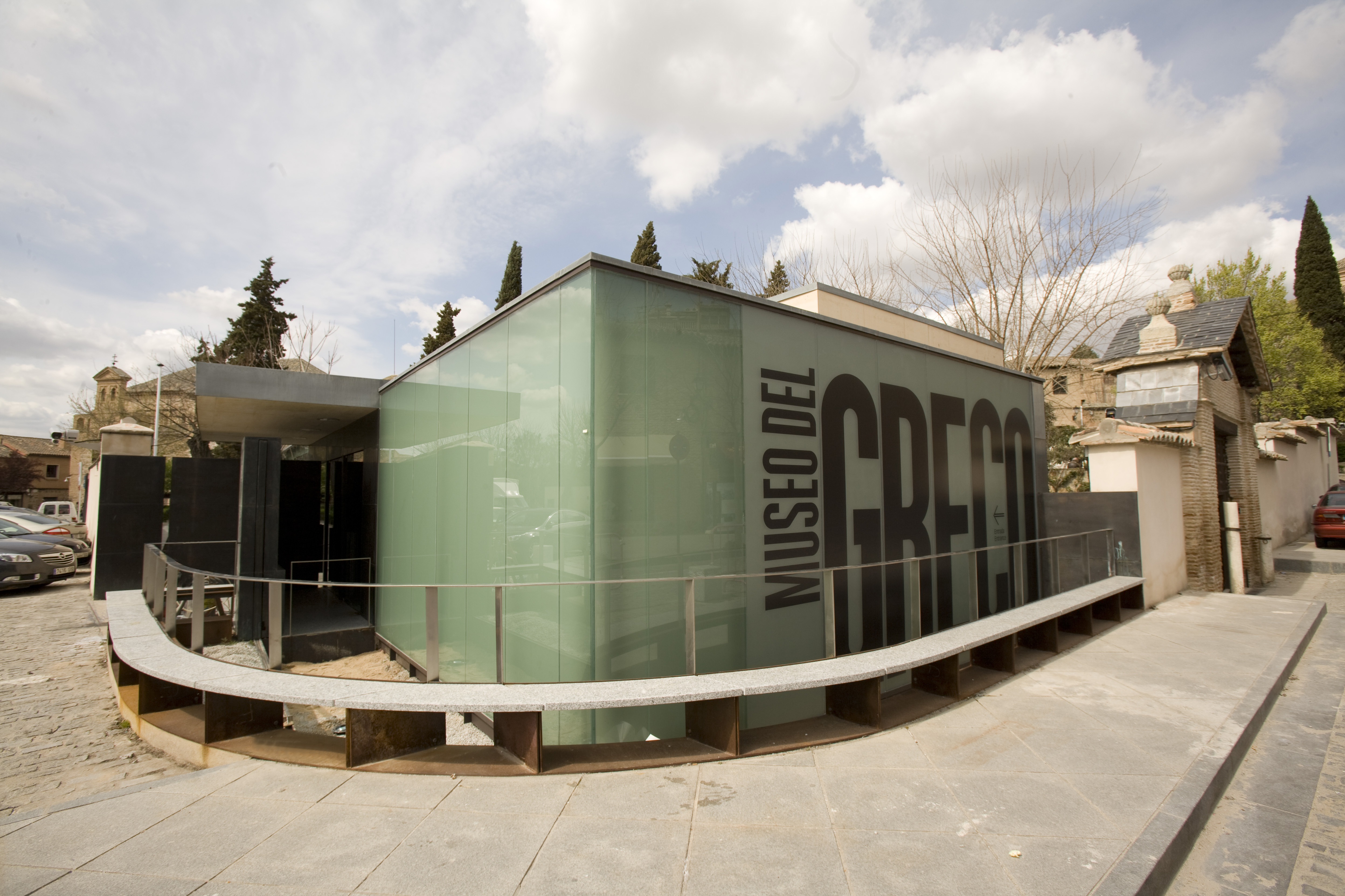 Vista del Museo desde el cruce entre el Paseo del Tránsito y la calle Alamillos dle Tránsito